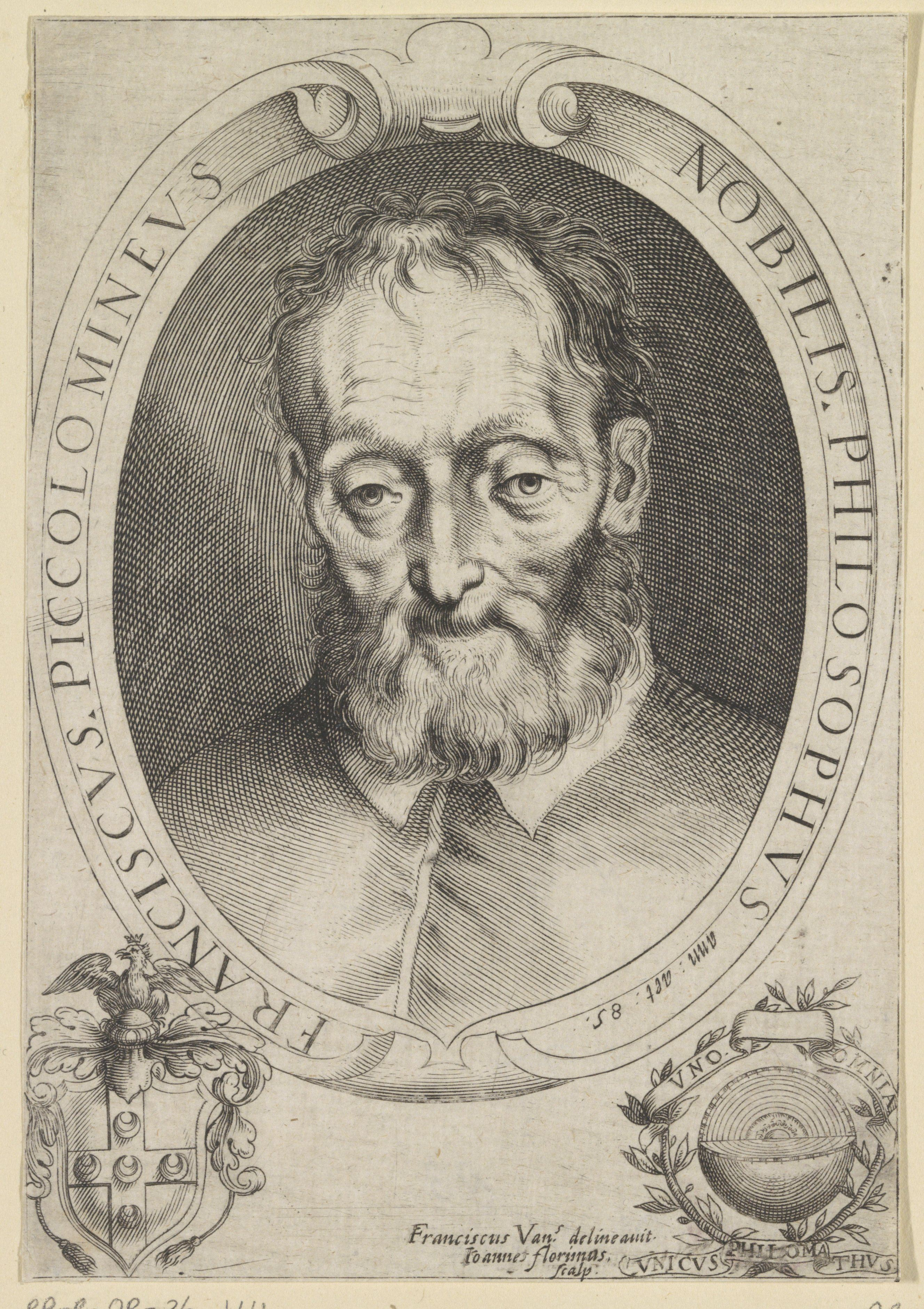 IdentificatieTitel(s): Portret van Francesco PiccolominiObjecttype: prent Objectnummer: RP-P-OB-36.114Opschriften / Merken: verzamelaarsmerk, verso, gestempeld: Lugt 240VervaardigingVervaardiger: prentmaker: Giovanni Florimi (vermeld op object)naar tekening van: Francesco Vanni (vermeld op object)Plaats vervaardiging: ItaliëDatering: 1600 - 1699Fysieke kenmerken: gravureMateriaal: papier Techniek: graveren (drukprocedé)Afmetingen: blad: h 156 mm (Binnen plaatrand afgesneden.) × b 109 mm (Binnen plaatrand afgesneden.)OnderwerpWat: historical personsWie: Francesco PiccolominiVerwerving en rechtenVerwerving: overdracht van beheer 1816Copyright: Publiek domein